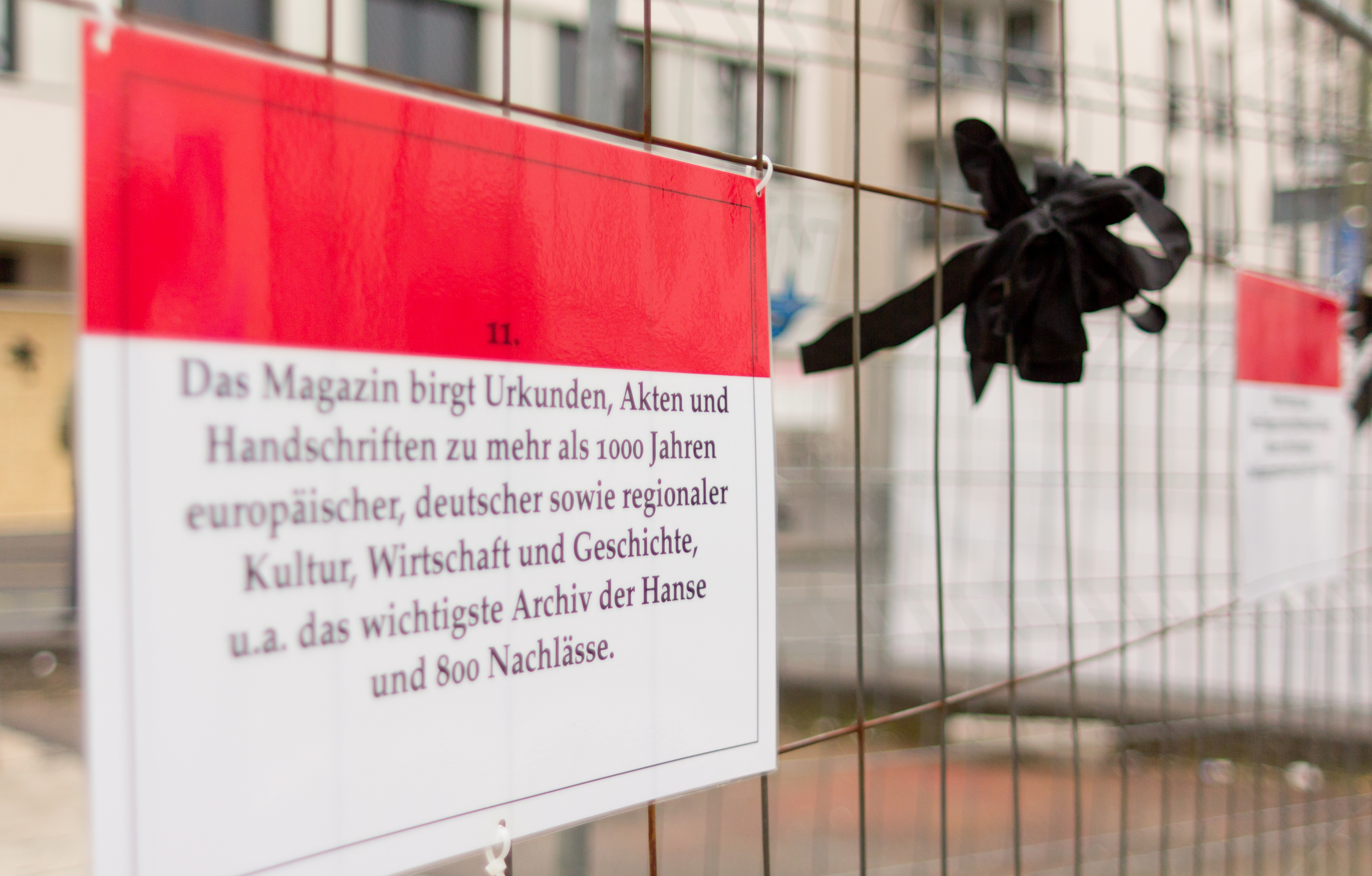 24 Sätze zu 8 Minuten – Schrifttafeln zum Einsturz des Historischen Archivs der Stadt Köln am Bauzaun an der Einsturzstelle (2012) von Reinhard Matz. Trauerschleife anlässlich des fünften Jahrestags des Einsturzes.